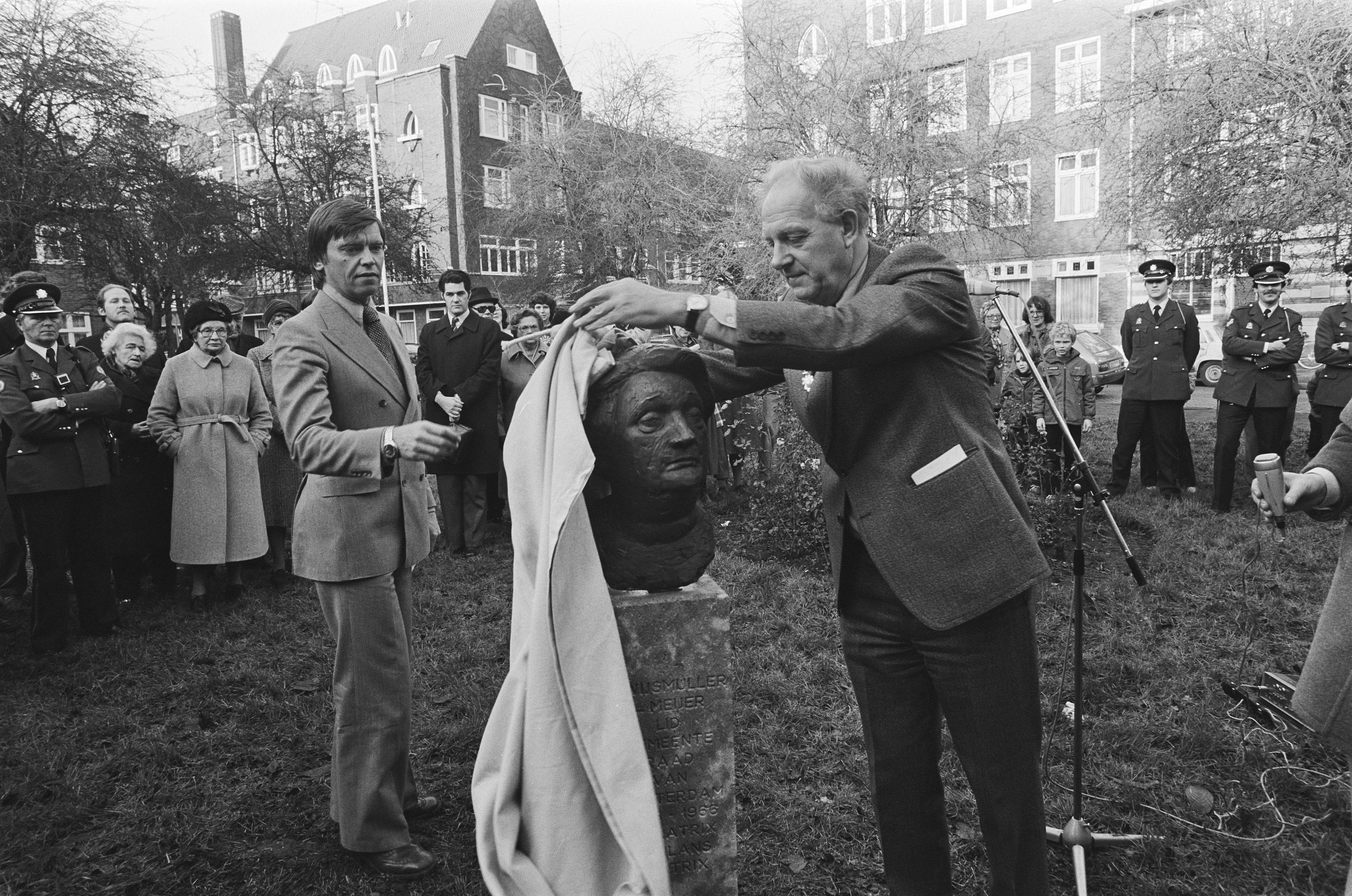 Collectie / Archief : Fotocollectie Anefo Reportage / Serie : [ onbekend ] Beschrijving : Borstbeeld van "Tante Truus" Wijsmuller onthuld door wethouder Kuypers in Amsterdam; onthulling Datum : 11 december 1978 Locatie : Amsterdam, Noord-Holland Trefwoorden : borstbeelden, onthullingen, wethouders Fotograaf : Dijk, Hans van / Anefo Auteursrechthebbende : Nationaal Archief Materiaalsoort : Negatief (zwart/wit) Nummer archiefinventaris : bekijk toegang 2.24.01.05 Bestanddeelnummer : 930-0406